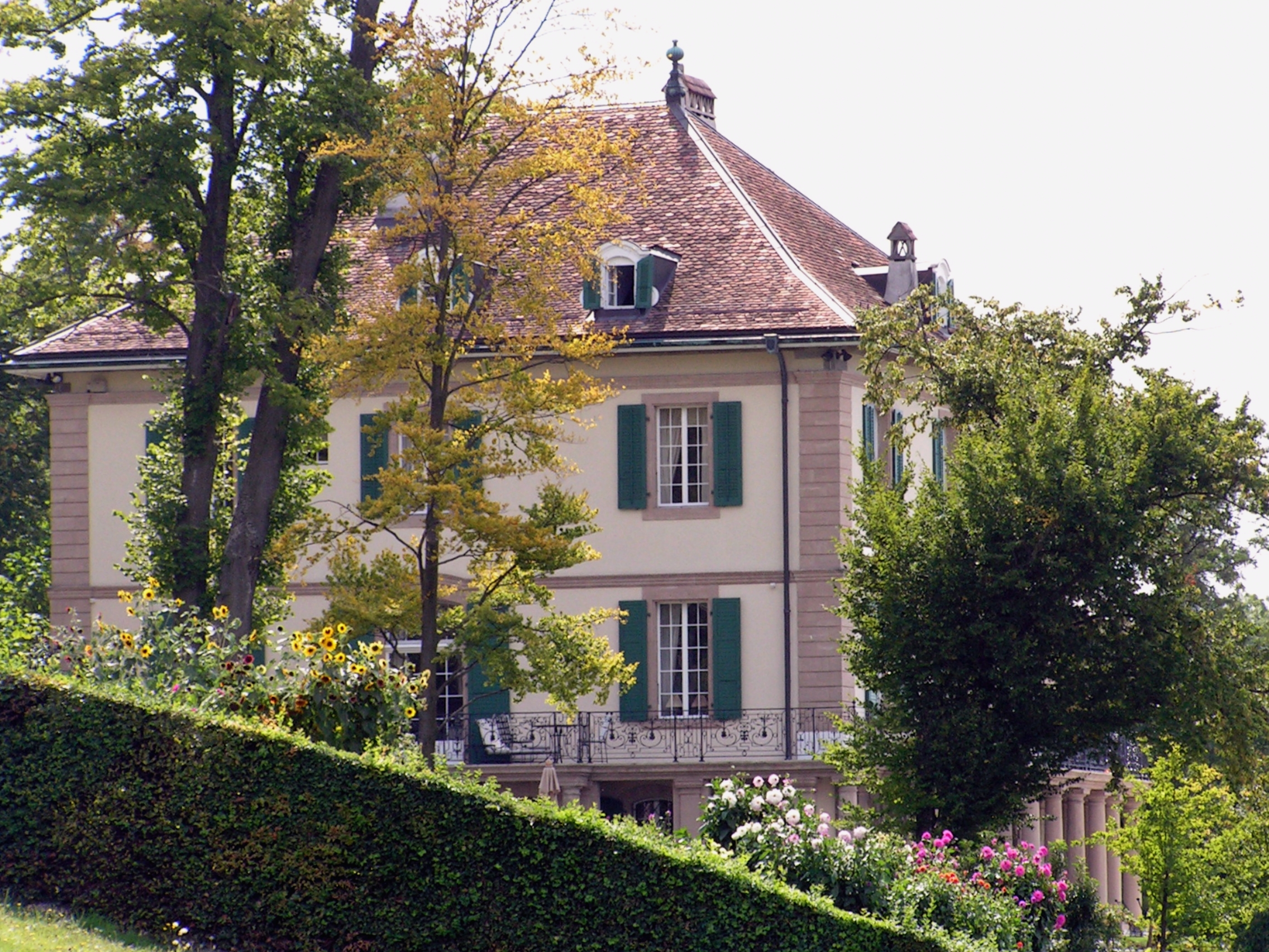 Chemin de Ruth 9, Cologny. Campagne Diodati.